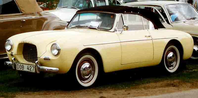 Volvo P1900 Sport Cabriolet 1956